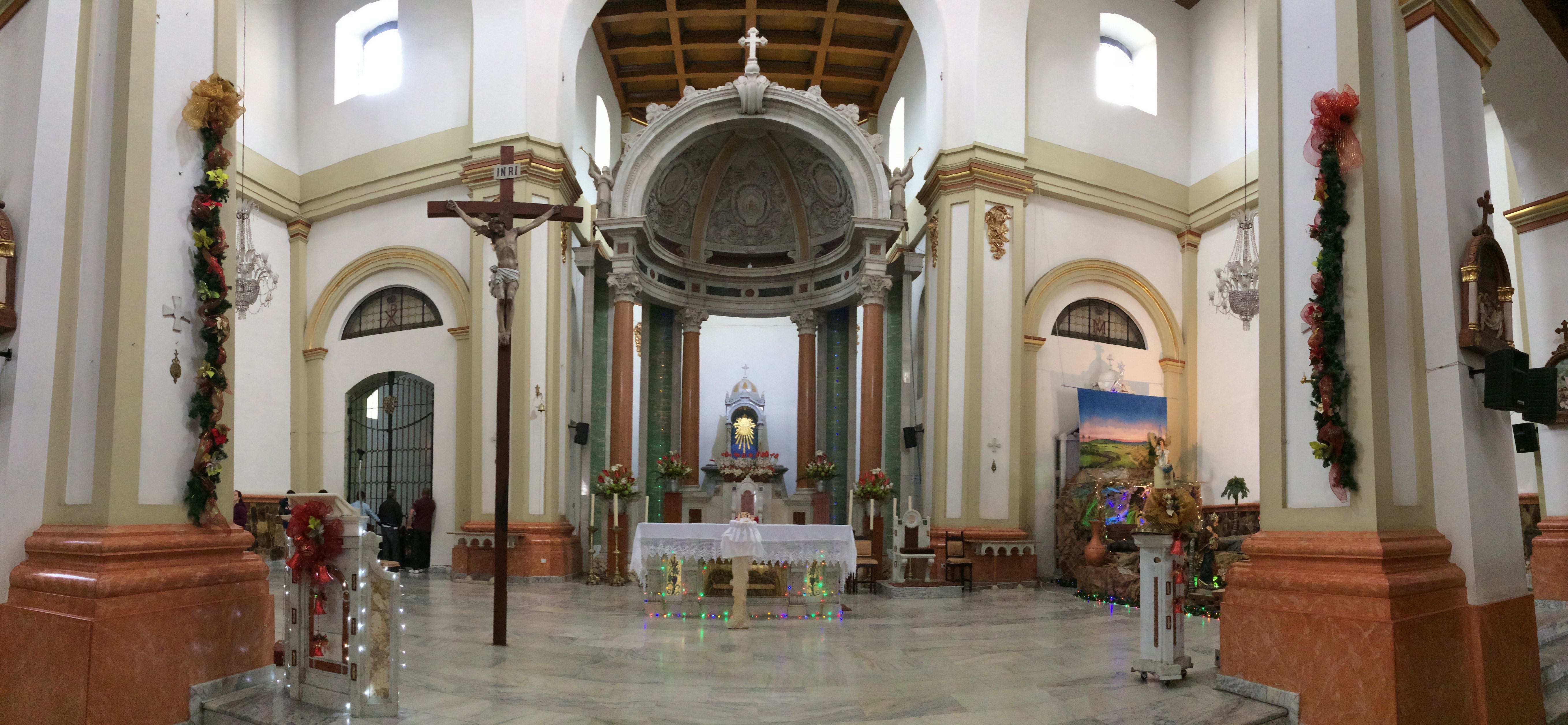 SANTA ROSA DE OSOS ANTIOQUIA - DETALLES DEL INTERIOR DE LA CATEDRAL Esta fotografía fue tomada en el municipio colombiano con código 05686.